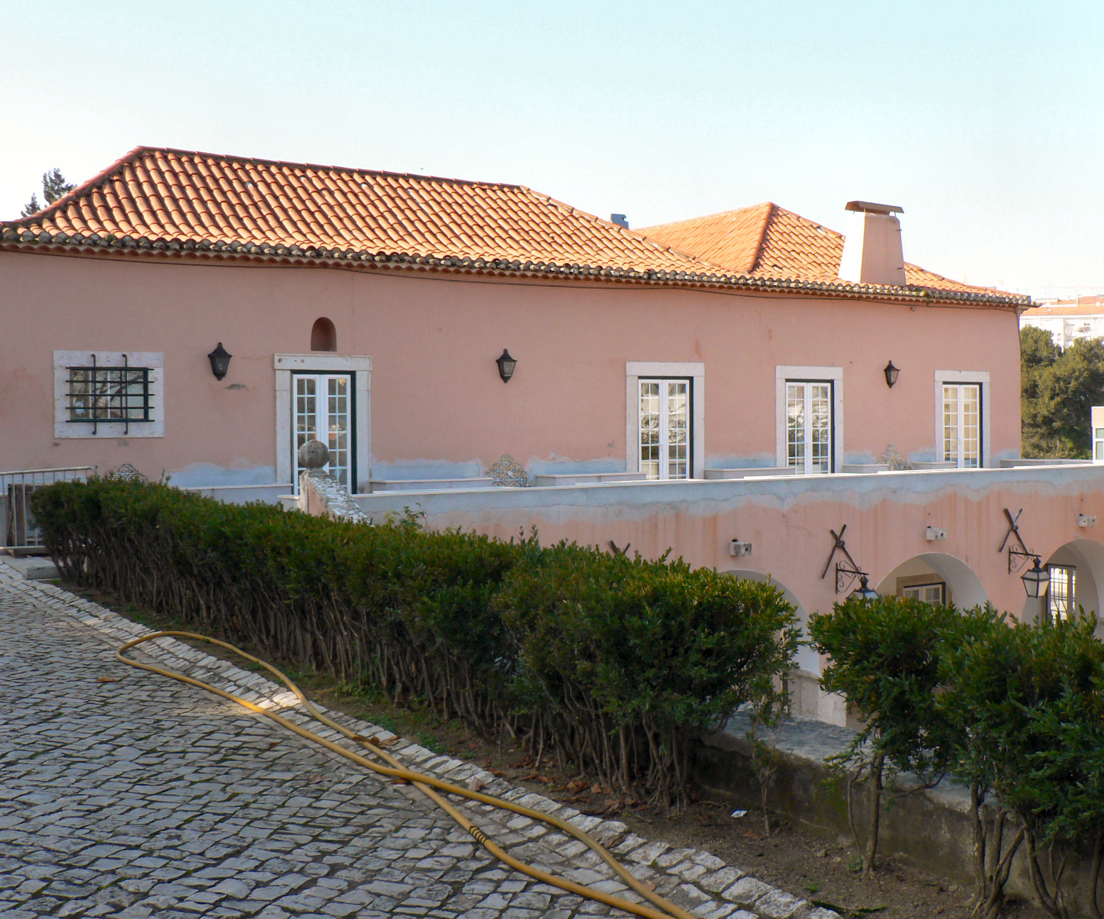 Quinta de São José em Sacavém, por Paulo Juntas